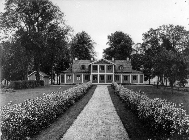 Bergshamra gård. Riven 1930